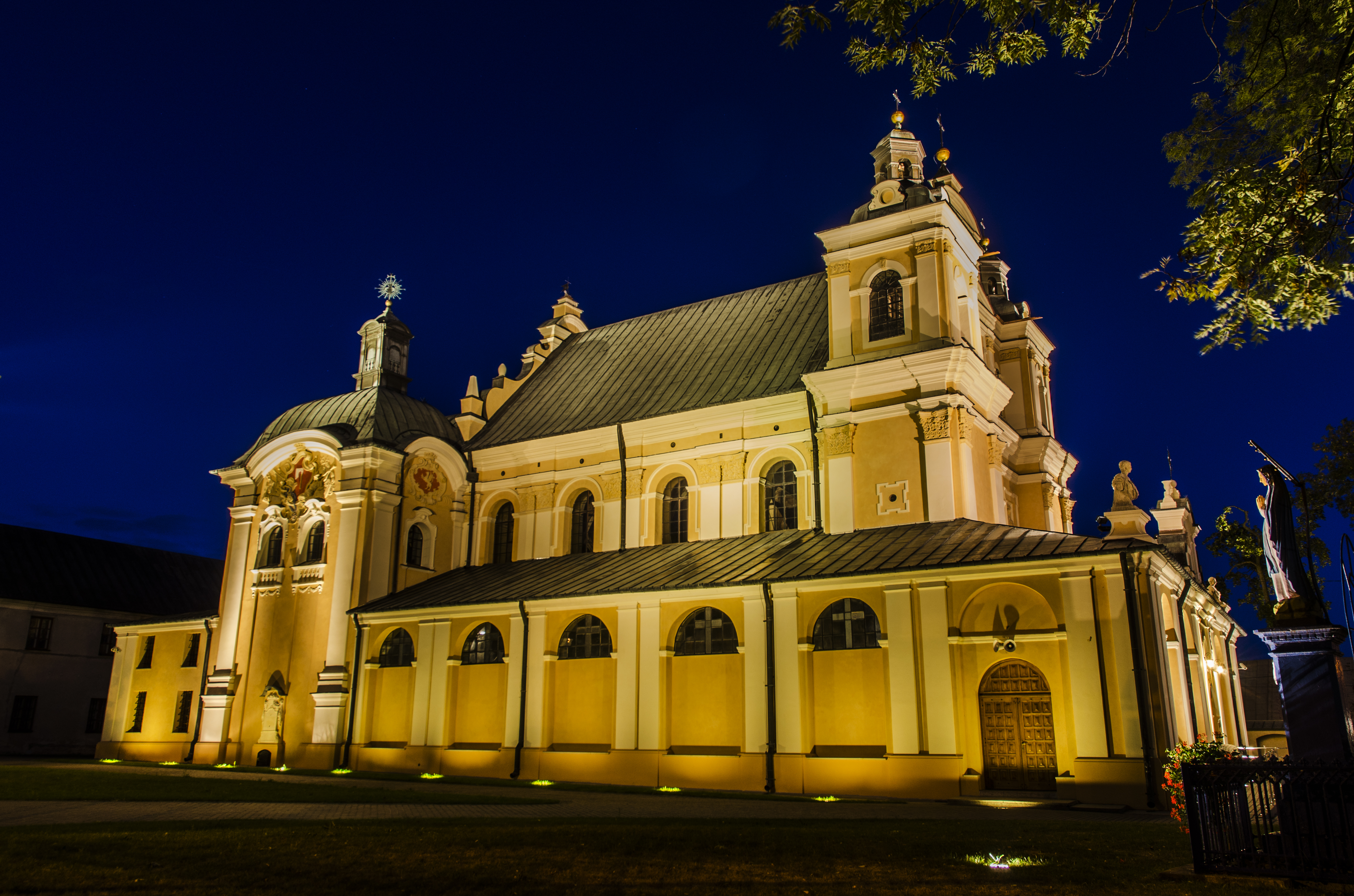 Opole Lubelskie, kościół, ob. p.w. Wniebowzięcia NMP, XVII, XIX